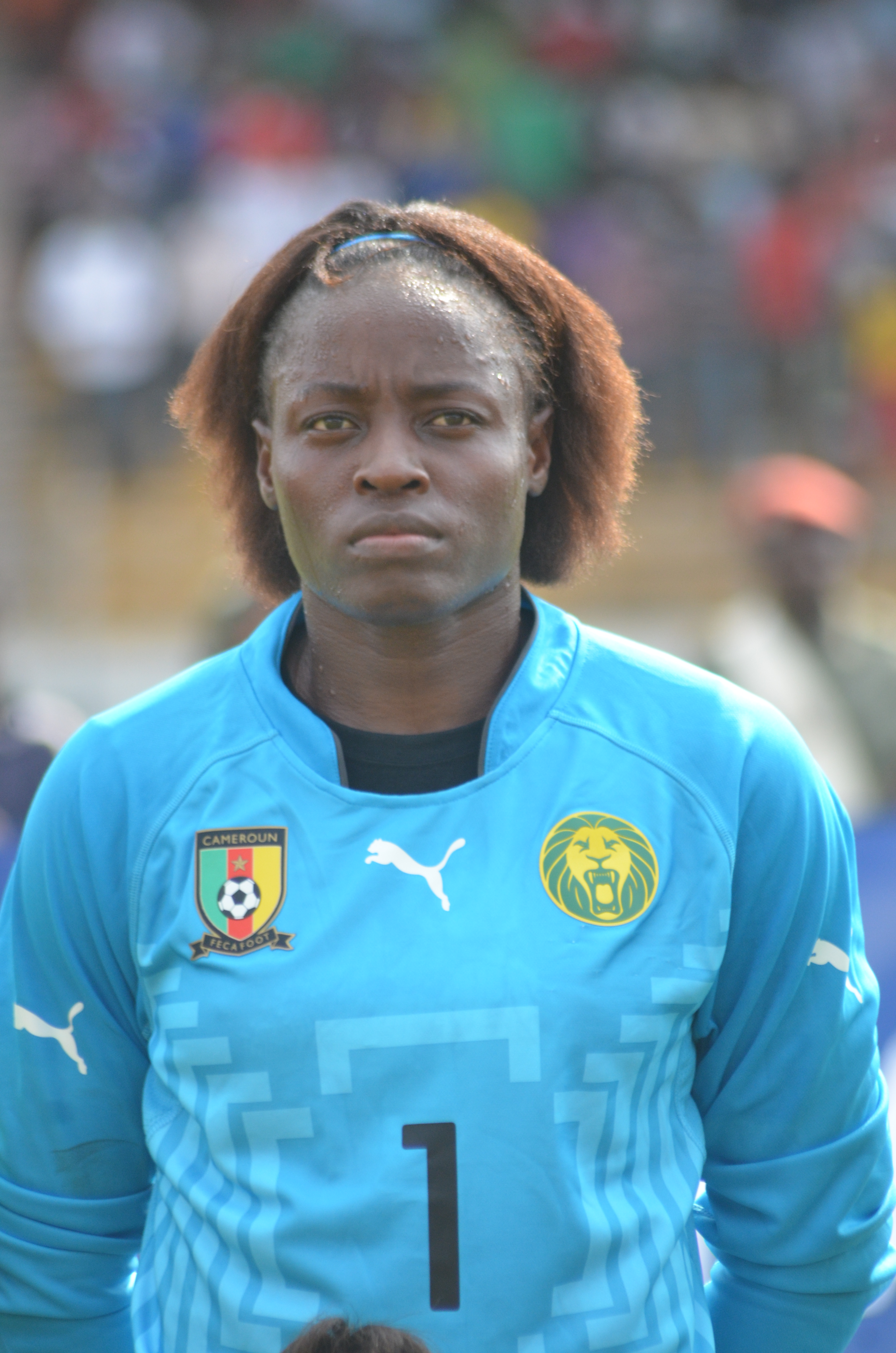 Gardienne de l'équipe de football du Cameroun